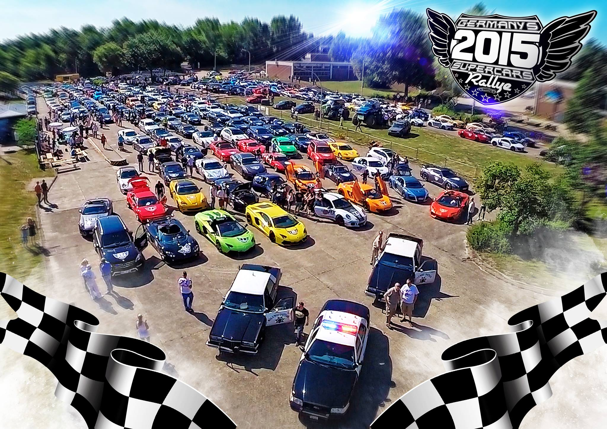 Das Teilnehmerfeld der GSR (2015) im Fursten Forest in Fürstenau.